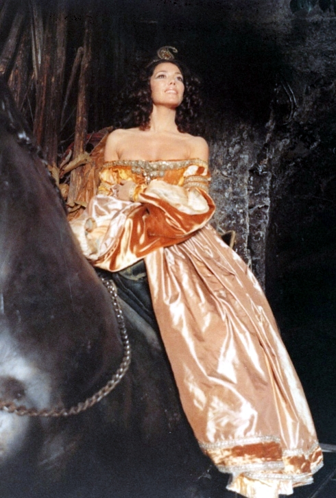 L’“Orlando furioso” di L. Ariosto Regia di Luca Ronconi Foto: Grazia Maria Spina (ruolo di Doralice)